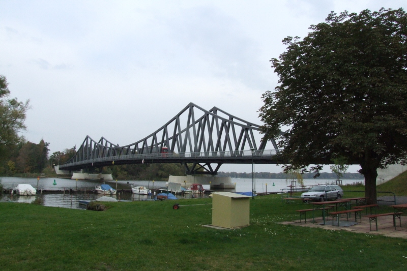 Die Seegartenbrücke von Plaue nach Kirchmöser